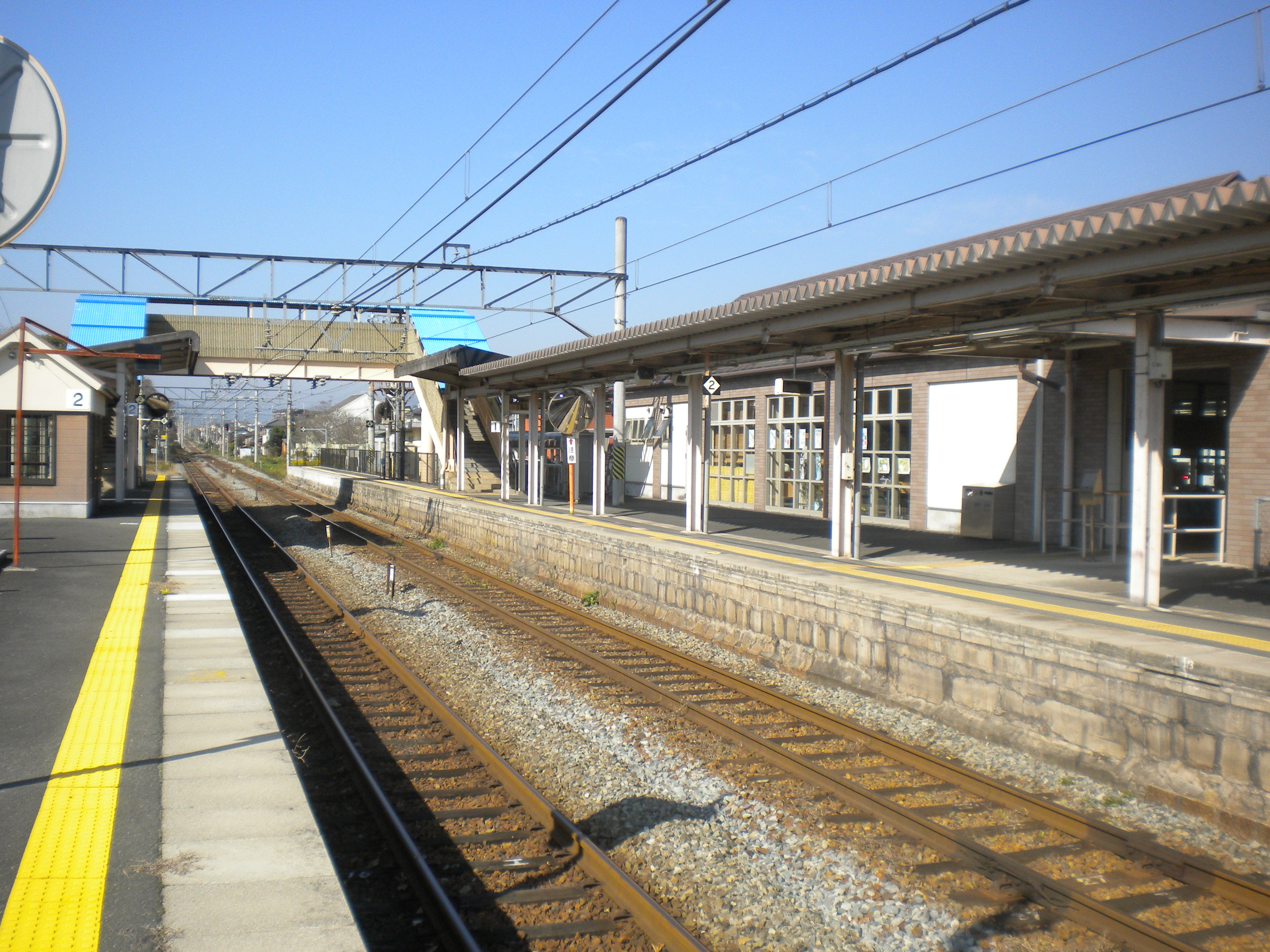 JR山陰本線胡麻駅